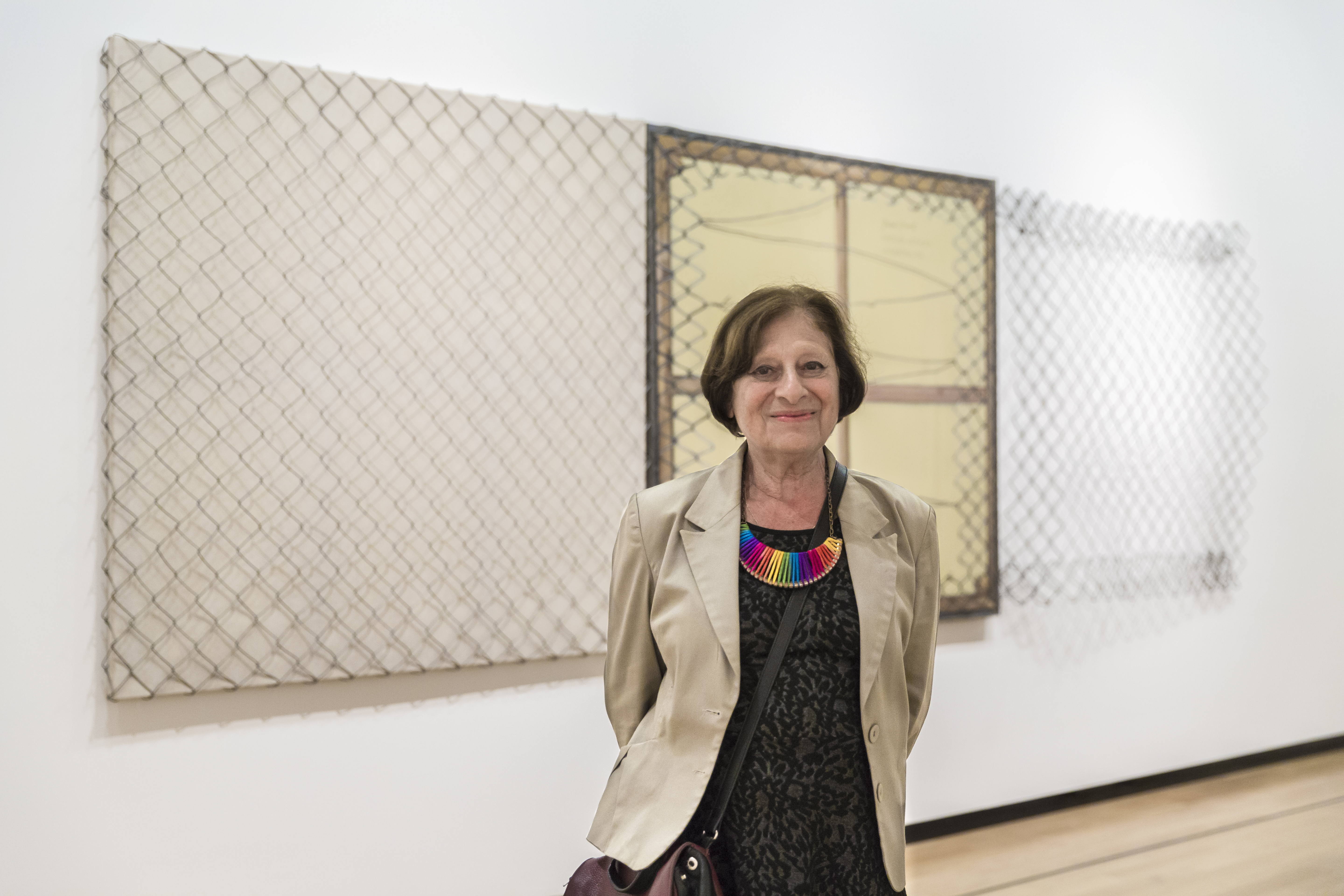 Diana Dowek - A la conquista de la luna. Buenos Aires, 1 de febrero de 2018 - En el Museo Nacional de Bellas Artes, se inauguró la muestra ¨A la conquista de la luna¨, que reúne obras de gran formato realizadas por mujeres, pertenecientes a la colección del Museo (son obras de gran formato, patrimonio del museo pero que no están exhibidas permanentemente). Fotos: Mauro Rico / Ministerio de Cultura de la Nación.